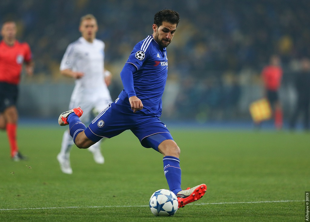 20.10.2015 Kyiv, Olimpiyskiy National Sports Complex Champions League. Group stage. FC Dynamo Kyiv - Chelsea - 0:0 Chelsea (4-2-3-1): Begovic; Zouma, Cahill, JT (c), Azpilicueta; Ramires, Matic; Willian, Fabregas (Oscar 75), Hazard; Diego Costa. Unused subs Blackman, Baba, Mikel, Traore, Kenedy, Falcao. Booked Zouma 67 Dynamo Kiev (4-1-4-1): Shovkovskiy; Danilo Silva, Khacheridi, Dragovic, Vida; Rybalka; Yarmolenko, Sydorchuk, Buyalskiy (Garmesh 83), Gonzalez; Kravets (Junior Moraes 78). Unused subs Rybka, Antunes, Petrovic, Gusev, Miguel Veloso. Booked Buyalskiy 65 20.10.2015 г.Киев. НСК "Олимпийский". Лига Чемпионов. Групповой этап Динамо — Челси 0:0 Динамо: Шовковский — Данило Силва, Драгович, Хачериди, Вида — Рыбалка, Буяльский (Гармаш, 83) — Ярмоленко, Сидорчук, Гонсалес — Кравец (Мораес, 78) Челси: Бегович — Аспиликуэта, Терри, Кэхилл, Зума — Матич, Рамирес — Виллиан, Фабрегас (Оскар, 75), Азар — Д. Коста Предупреждения: Буяльский — Зума